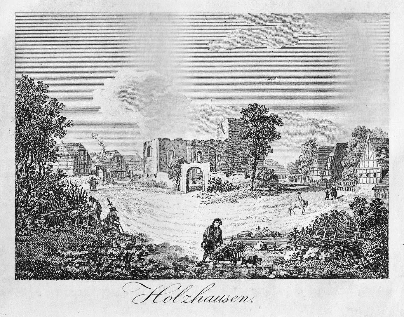 Ansicht von Holzhausen mit zerstörter Kirche nach der Völkerschlacht 1813